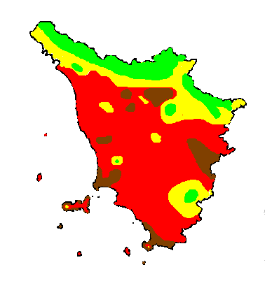 Carta della temperatura media di luglio in Toscana (1961-1990) 24 °C